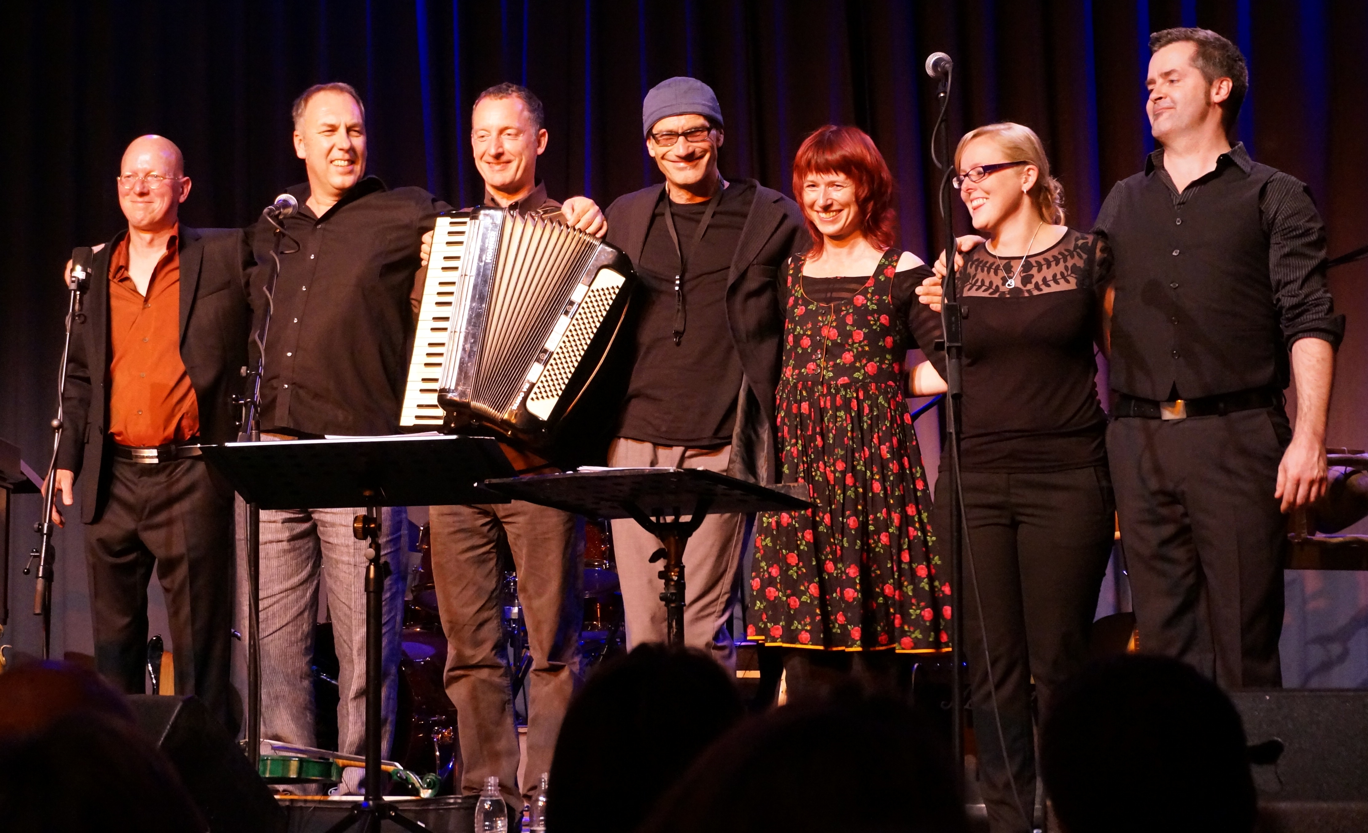 Monika Drasch und Band mit dem Programm "Auf der böhmischen Grenz" im Veranstaltungsforum Fürstenfeld in Fürstenfeldbruck im Juni 2013